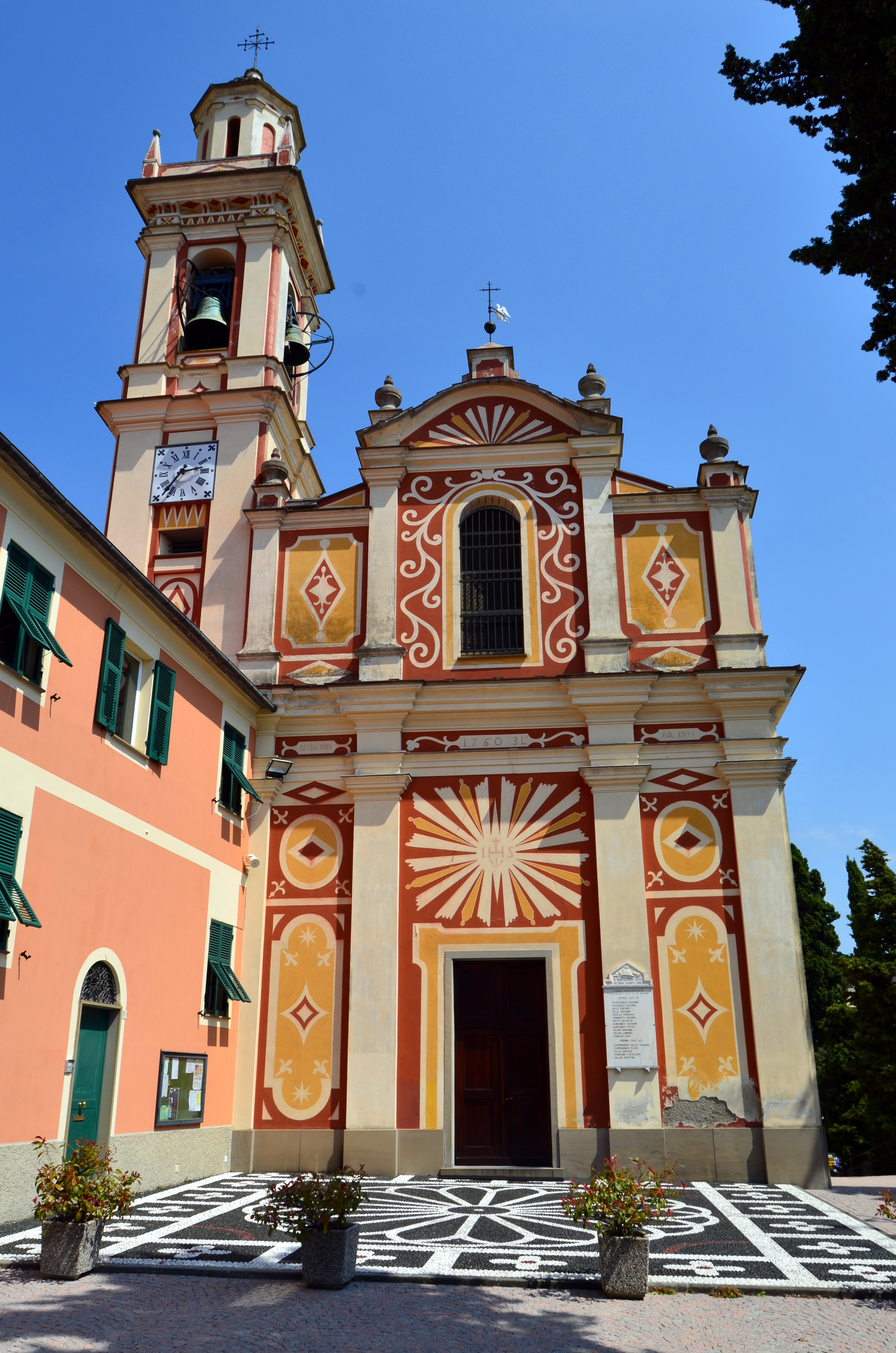 La chiesa di San Bartolomeo apostolo, San Bartolomeo, Leivi, Liguria, Italia